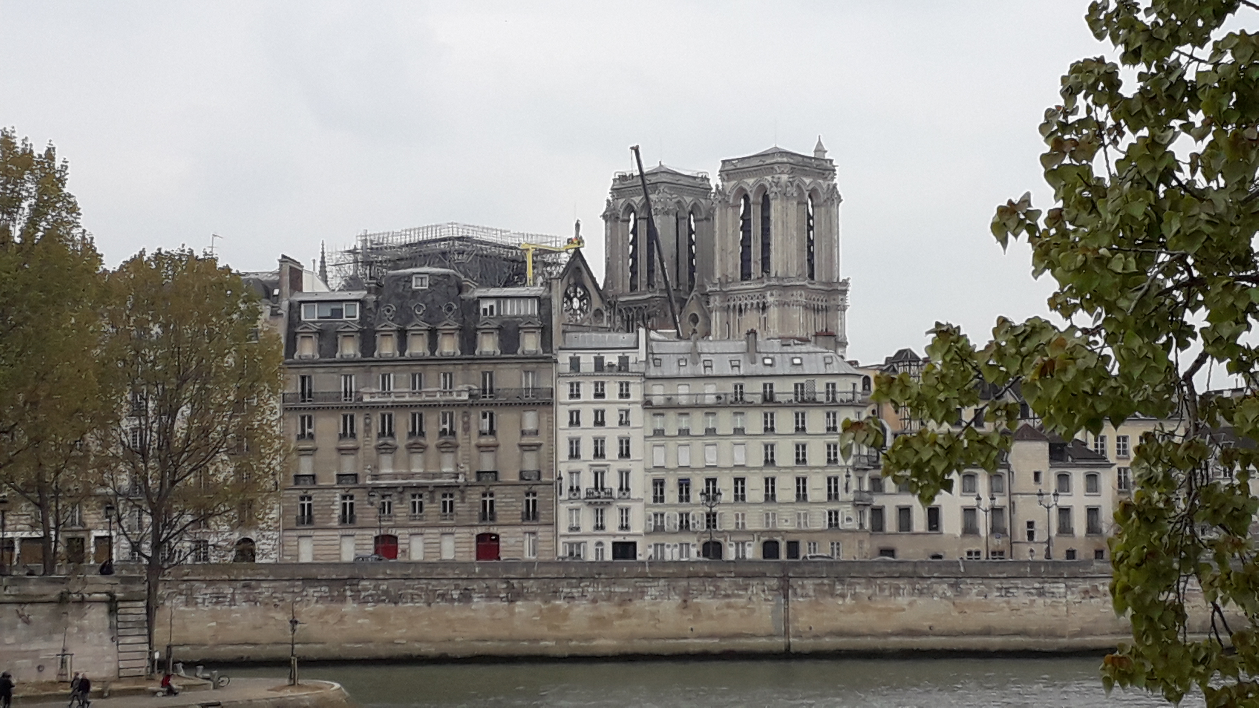 Notre-Dame vu depuis lle pont Louis-Philippe, 16 avril 2019